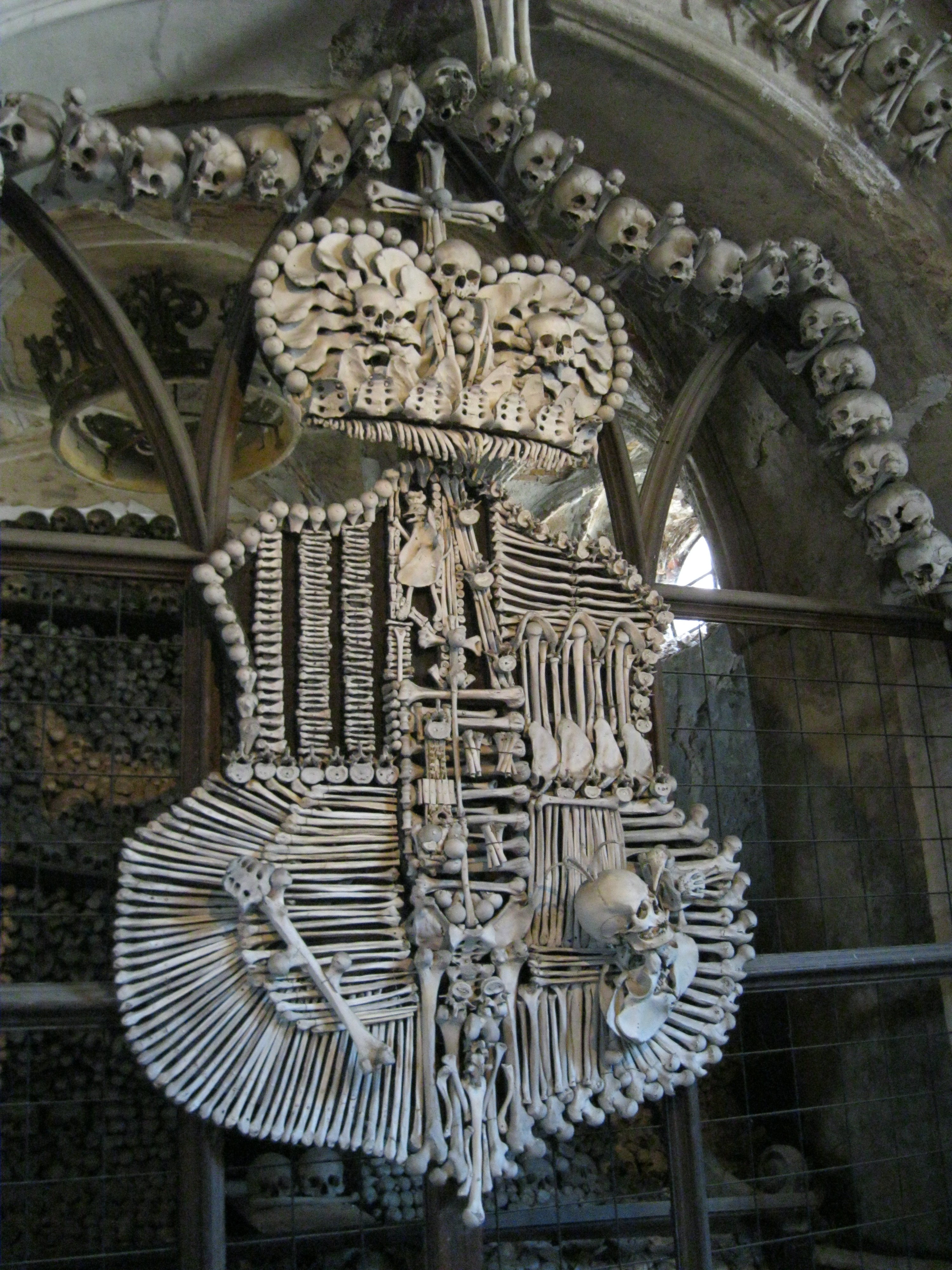 Kaple Všech svatých s kostnicí, hřbitovní (Sedlec)